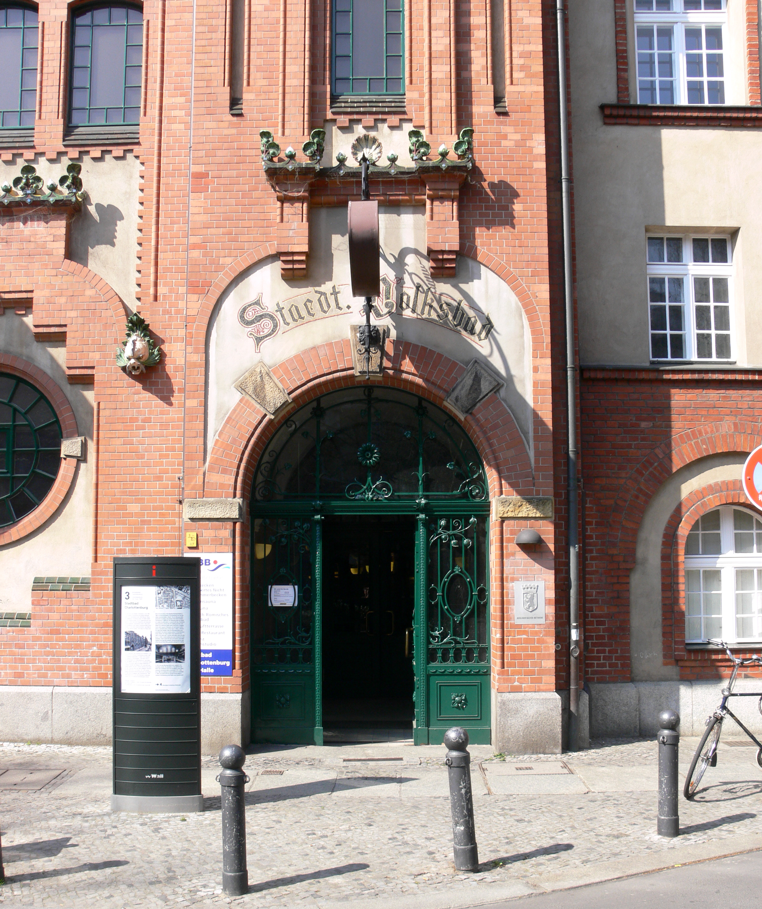 Berlin-Charlottenburg, Krumme Straße Stadtbad Charlottenburg, Alte Halle, Eingang